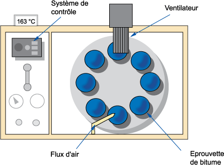 Schéma d'un appareil d'essai RTFOT, permettant d'évaluer le vieillissement d'un liant bitumineux.